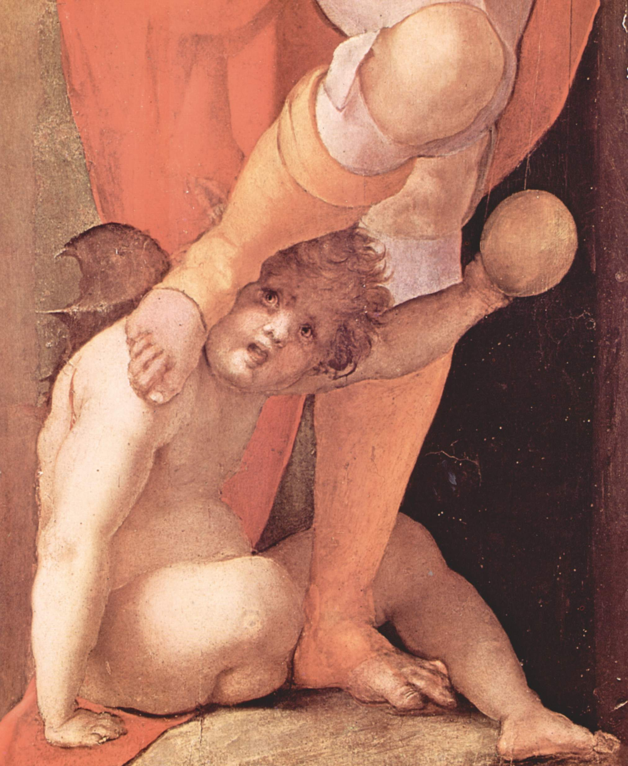 detail, Fragment